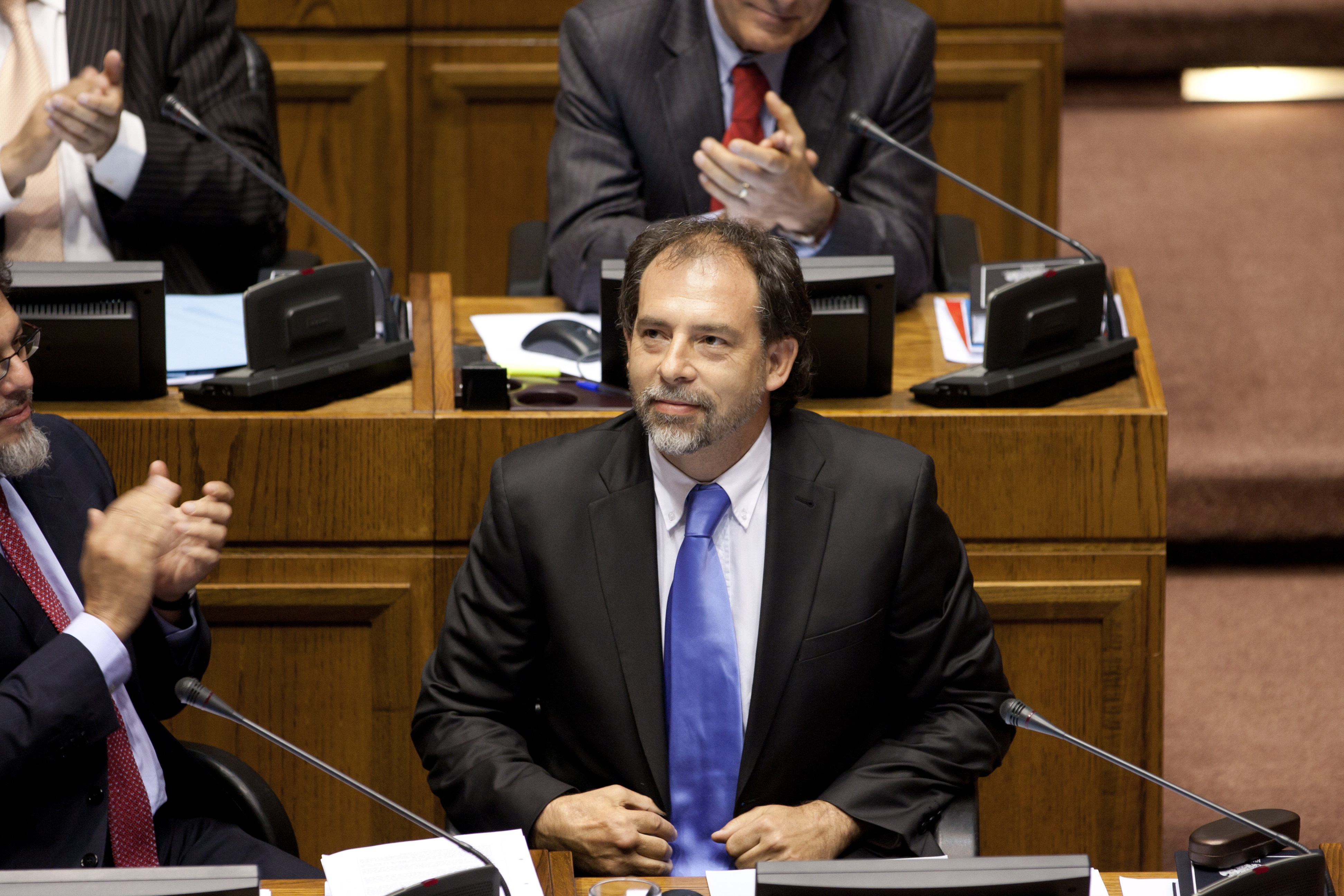 El senador estará en el cargo un año, según lo dispone el acuerdo político comprometido por la Concertación de rotar el cargo entre los partidos que la integran. Además de presidir la mesa de la corporación, forma parte de la Comisión de Derechos Humanos, Nacionalidad y Ciudadanía; y de Régimen Interior de la Cámara Alta.